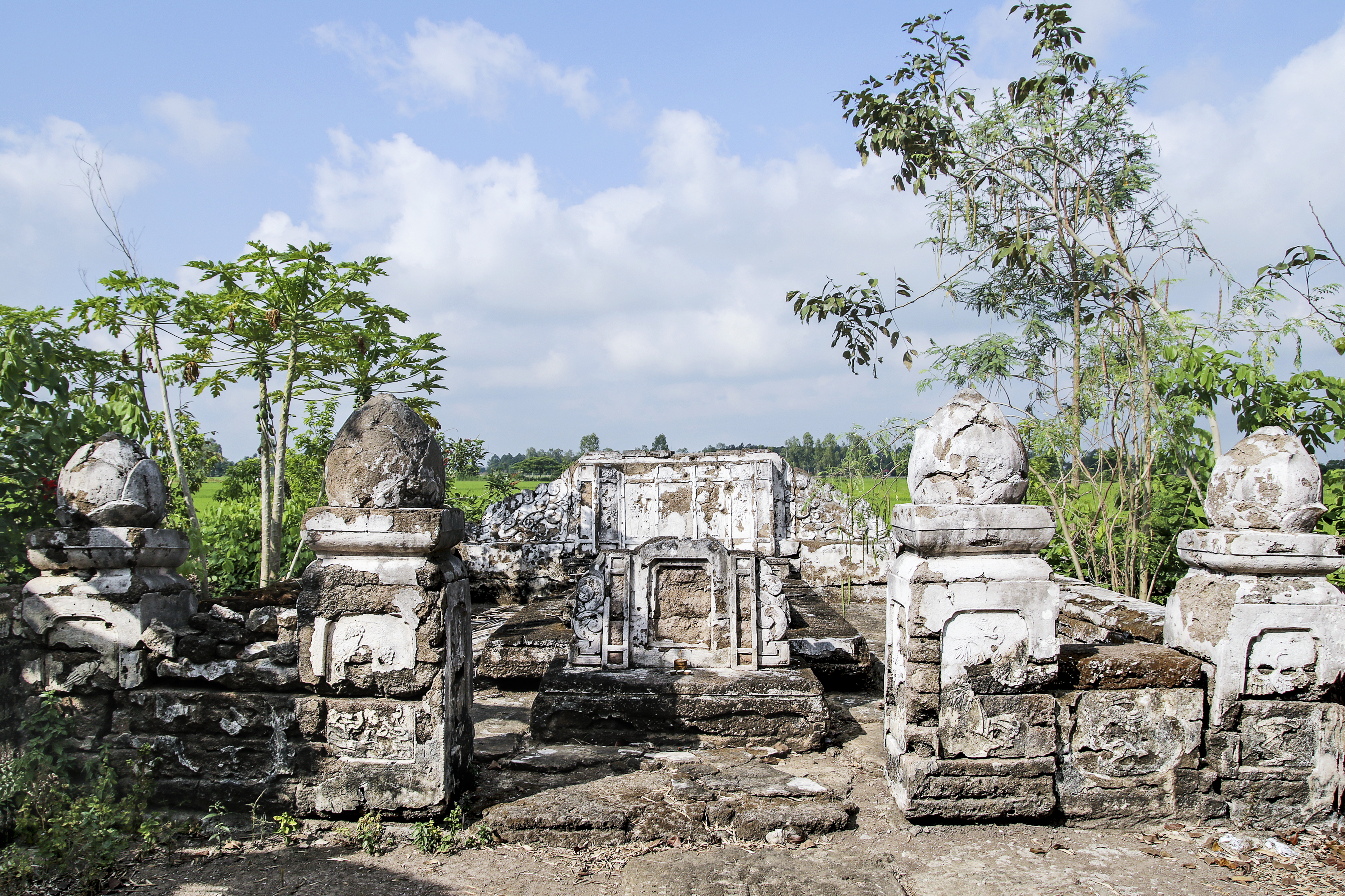 Dùng cho bài viết về ông Nguyễn Văn Mậu trong wiki Tiếng Việt.